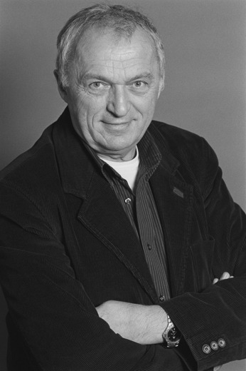 Das Foto Zeigt den Kabarettisten Gert Kießling. Offizielles Ensemble Foto der Distel Homepage.